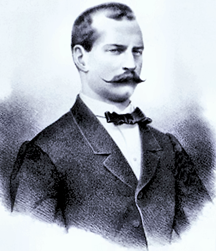 Girolamo de Alesani/Hieronymus Freiherr von Alesani, als Kreishauptmann vor 1870